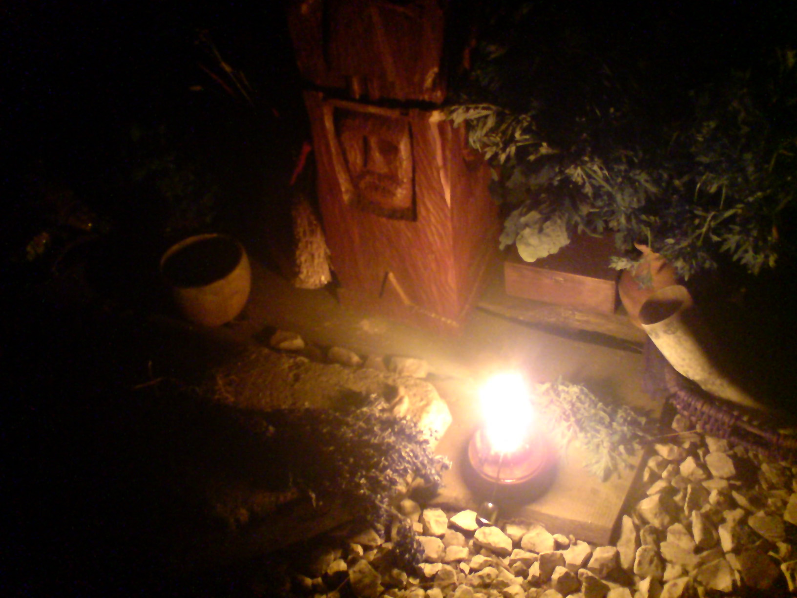 Noc Kupały - ofiarowanie pokarmów w trakcie obchodów RKP (2009).